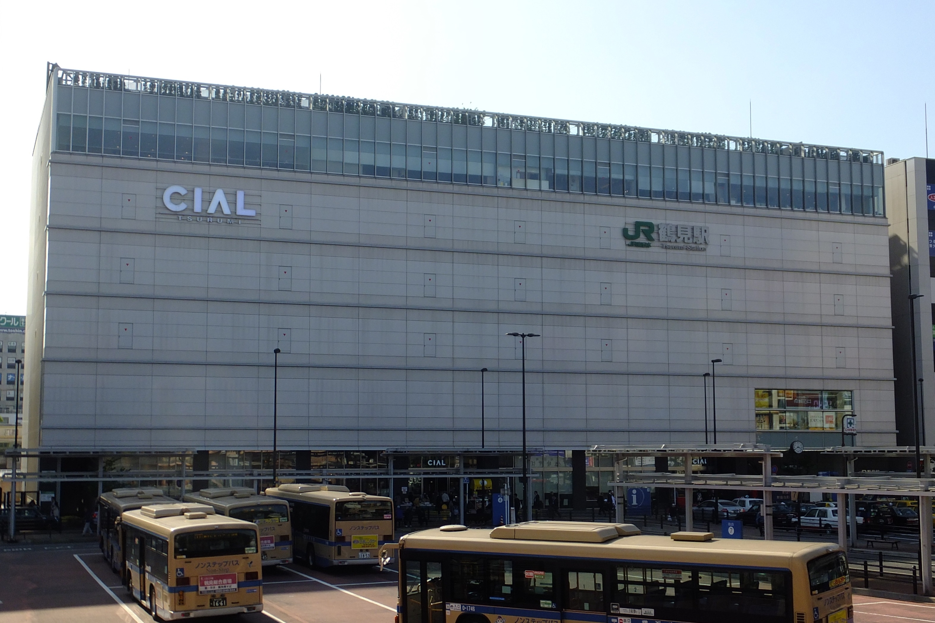 JR京浜東北線（東海道本線）鶴見駅東口駅ビルCIAL。